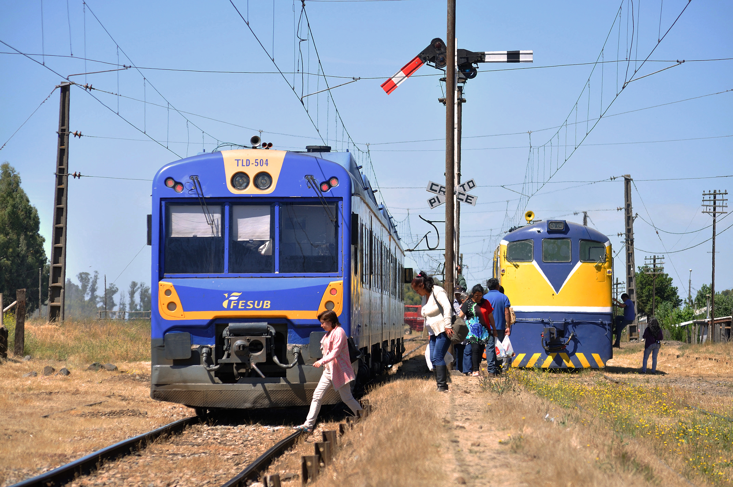 Harto movimiento ferroviario en el día de ayer Domingo en la zona de la Araucania. En via local, D16005 rumbo a Victoria, y en via principal TLD 504 rumbo a Temuco.